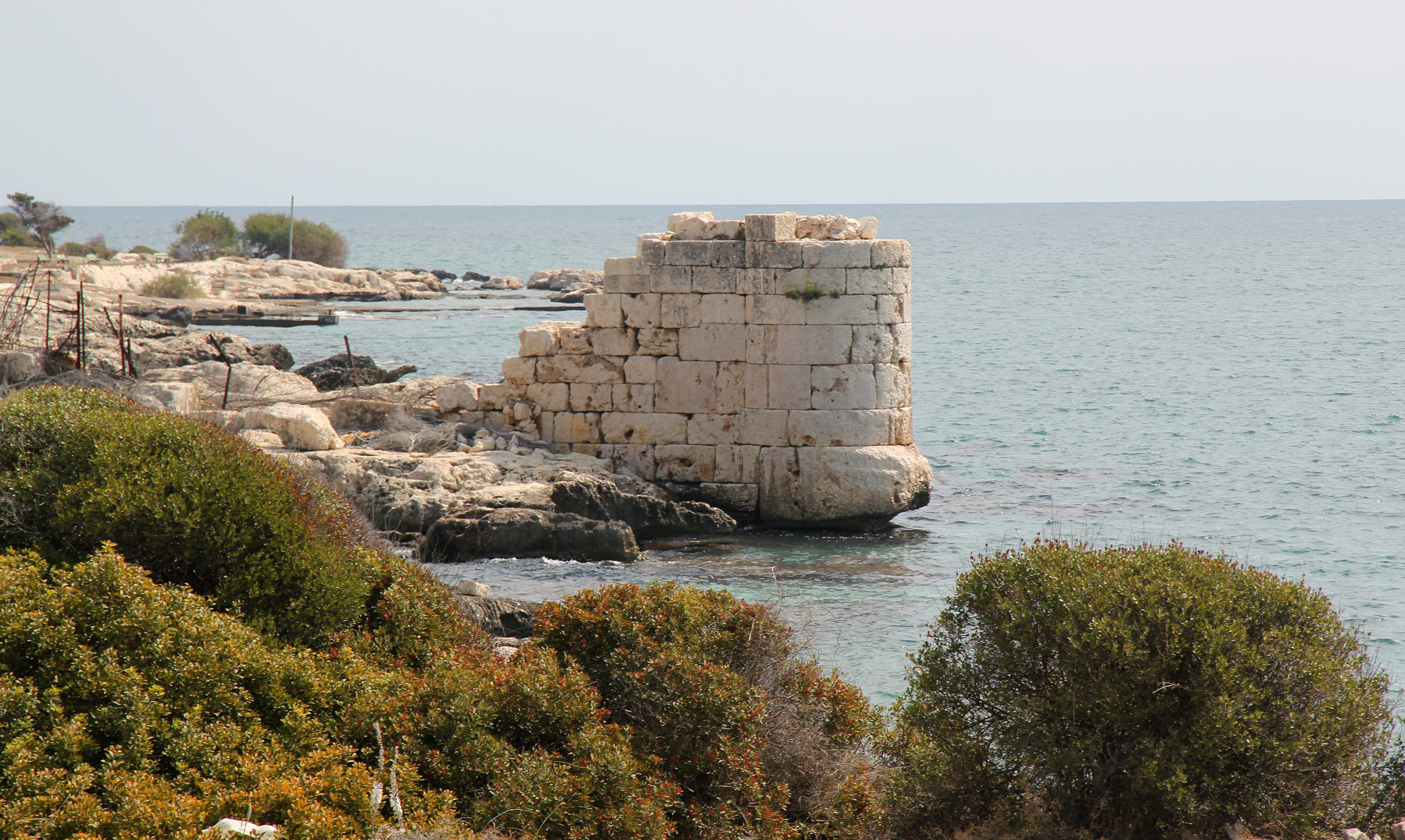 Korykos, archäologischer Fundort in der Südtürkei, antike Hafenanlagen mit dem Endturm der Stadtmauer